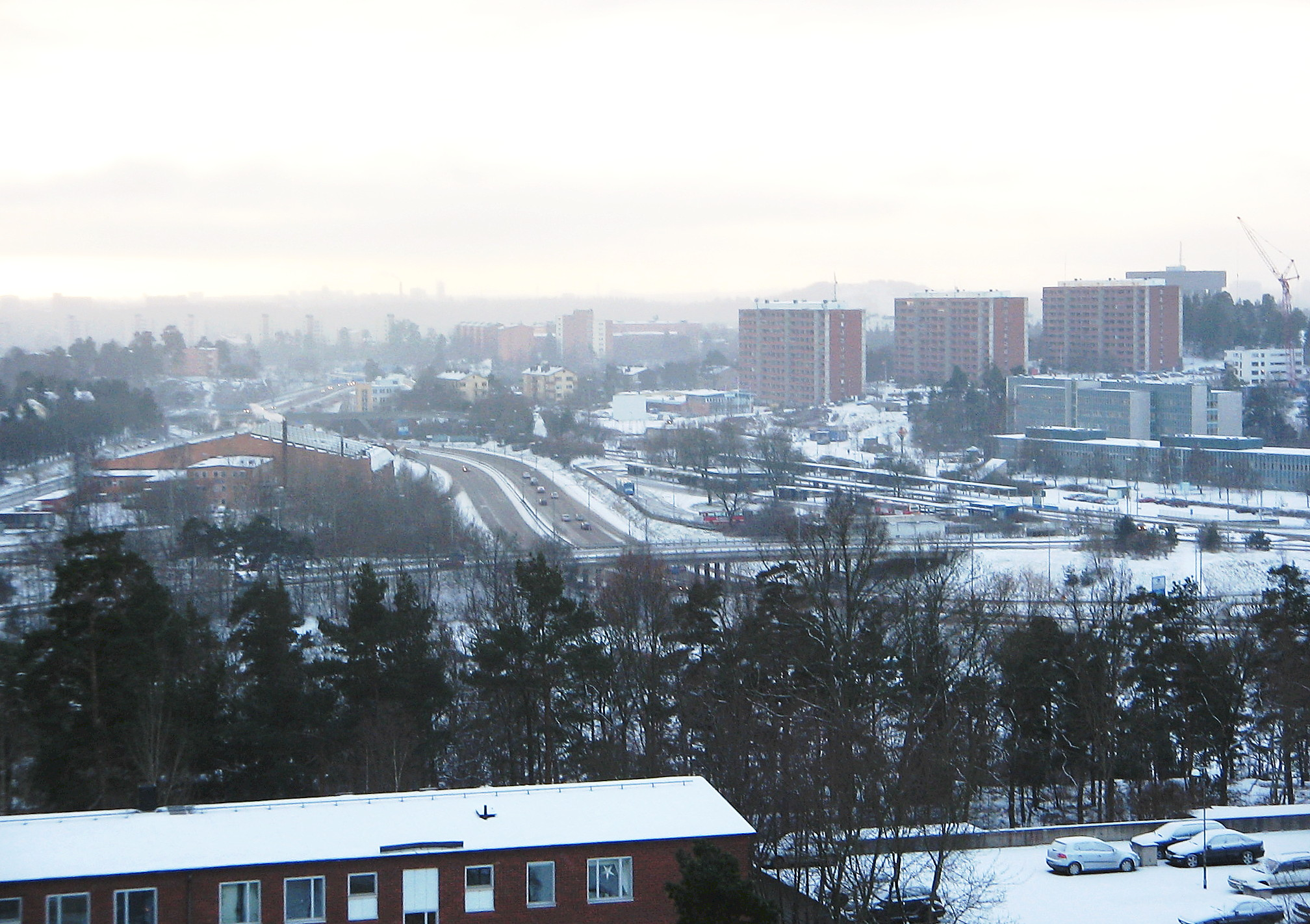 Utsikt över Danderyd, 2006. Photograph taken by me